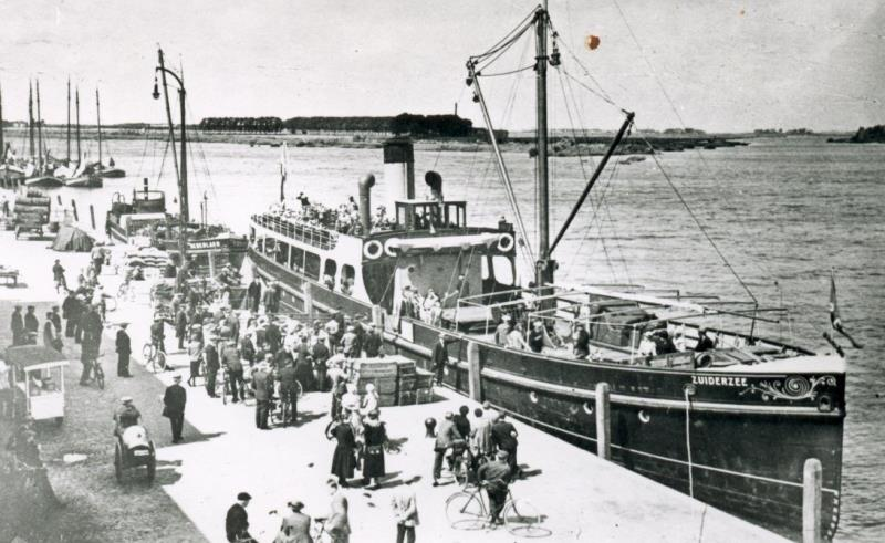 De SS Zuiderzee van rederij Verschure, afgemeerd aan de kade